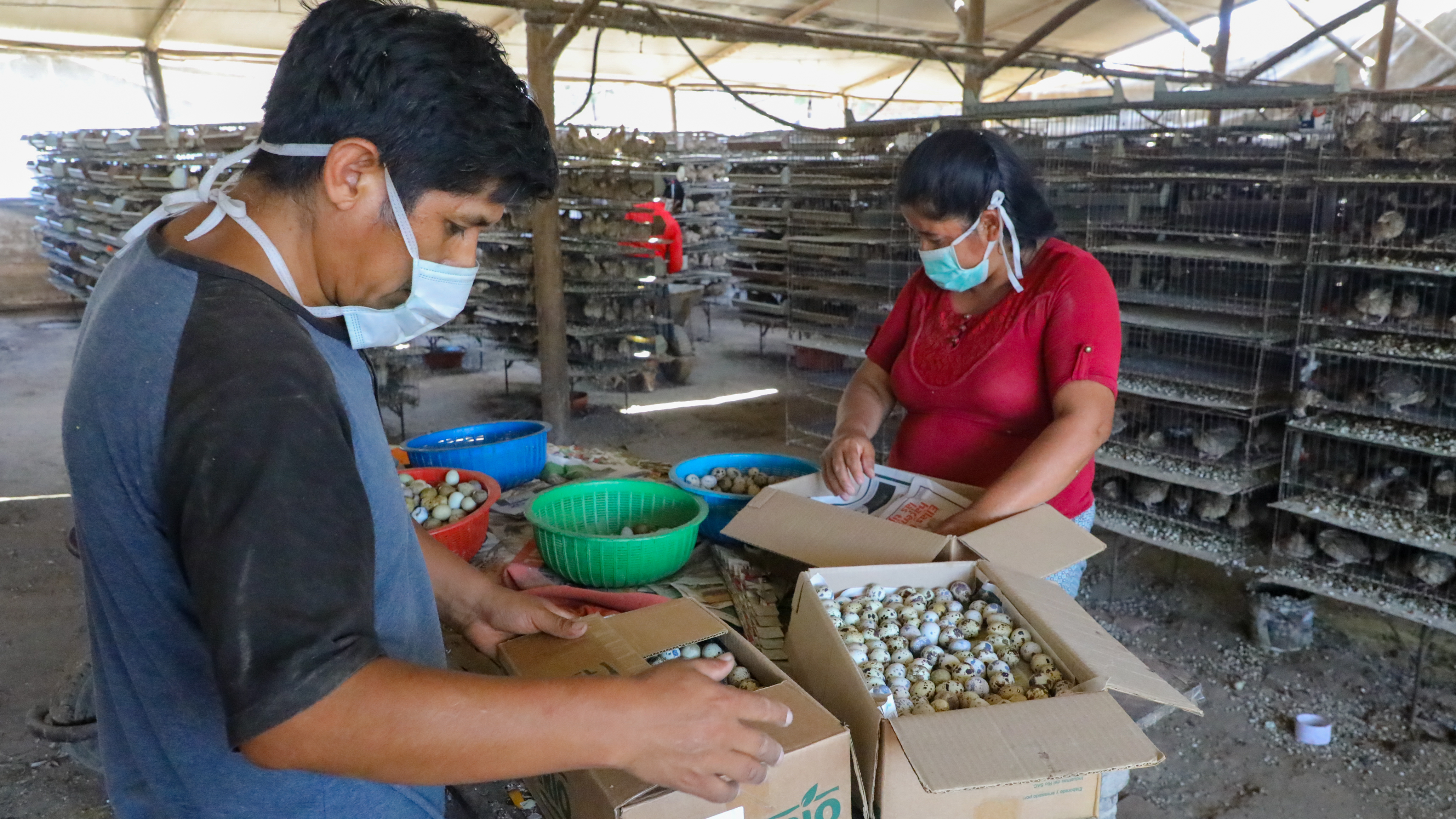 La ministra de la Producción, Rocío Barrios, junto a un equipo de Produce, llegó a Lurín para conocer las necesidades del productor de huevos de codorniz, Richard Huaraca, y brindarle asistencia técnica para sostener e impulsar su negocio durante la emergencia nacional.